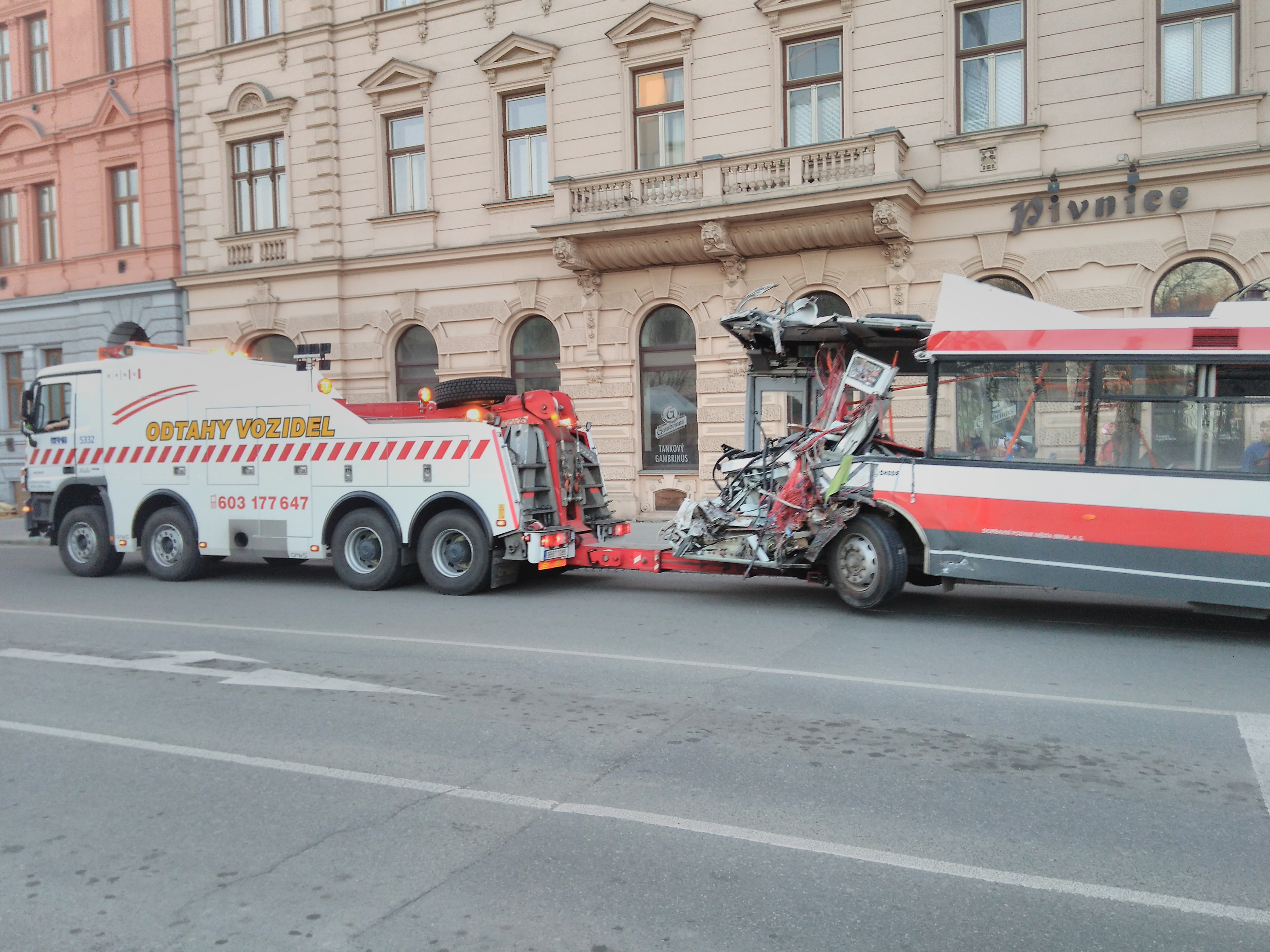 Brno, trolejbus je odvážen ze srážky na Křenové